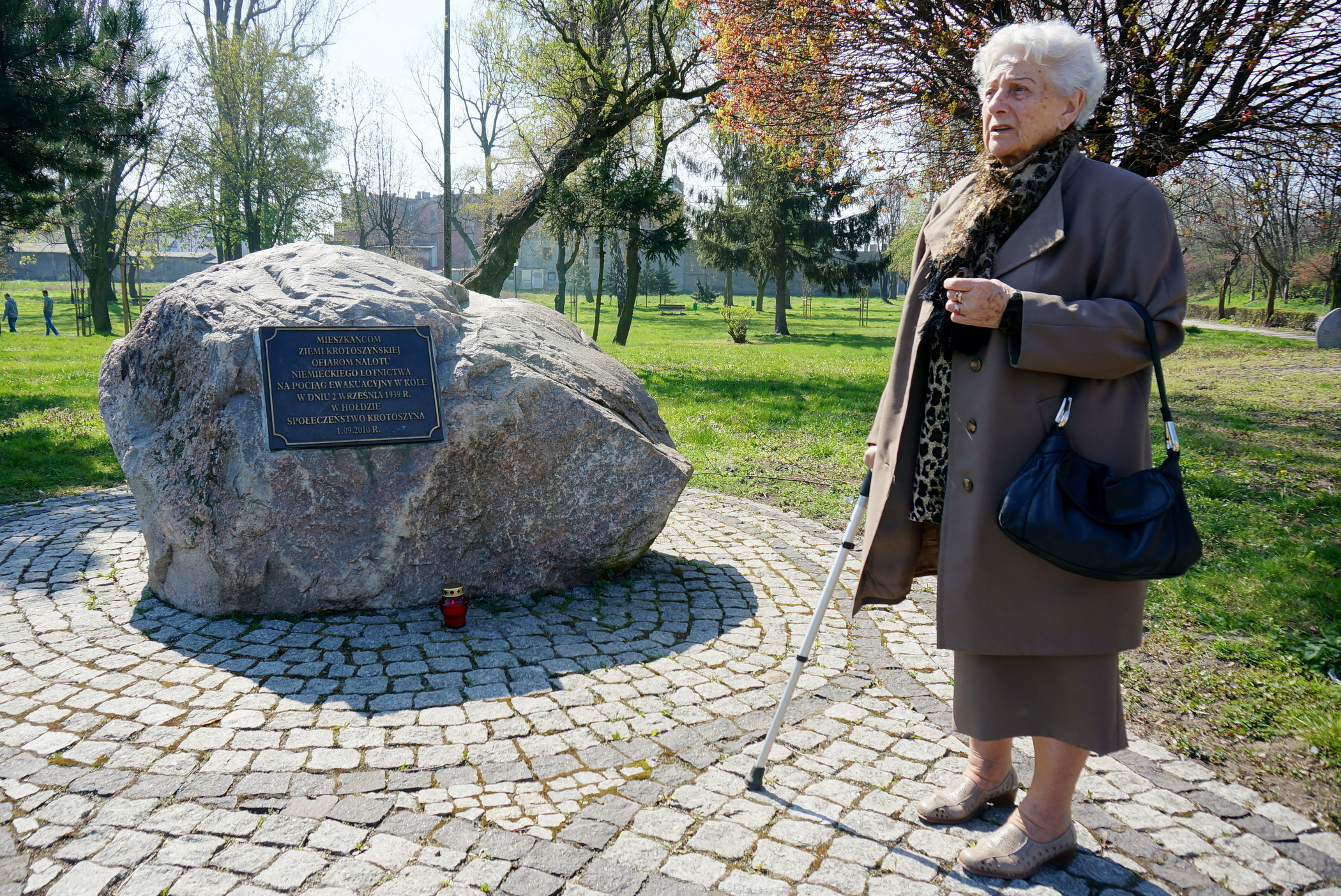 Krotoszyn, ul. Dworcowa. Kamień upamiętniający mieszkańców ziemi krotoszyńskiej którzy zginęli w nalocie niemieckiego lotnictwa na cywilny pociąg ewakuacyjny. Pociąg ten, który wyruszył z Krotoszyna 1 września 1939 r., został następnego dnia zbombardowany na bocznicy stacji kolejowej w Kole. Rozbiegający się w popłochu uchodźcy zostali ostrzelani z broni pokładowej przez niemieckich lotników. Zginęło i zmarło z ran 119 osób. Na fotografii, wspominająca tamte wydarzenia Irena Kaczmarek, córka pracownika Urzędu Skarbowego Stanisława Dziubińskiego, która wraz z rodzicami i siostrami szczęśliwie ocalała z tego barbarzyńskiego ataku.